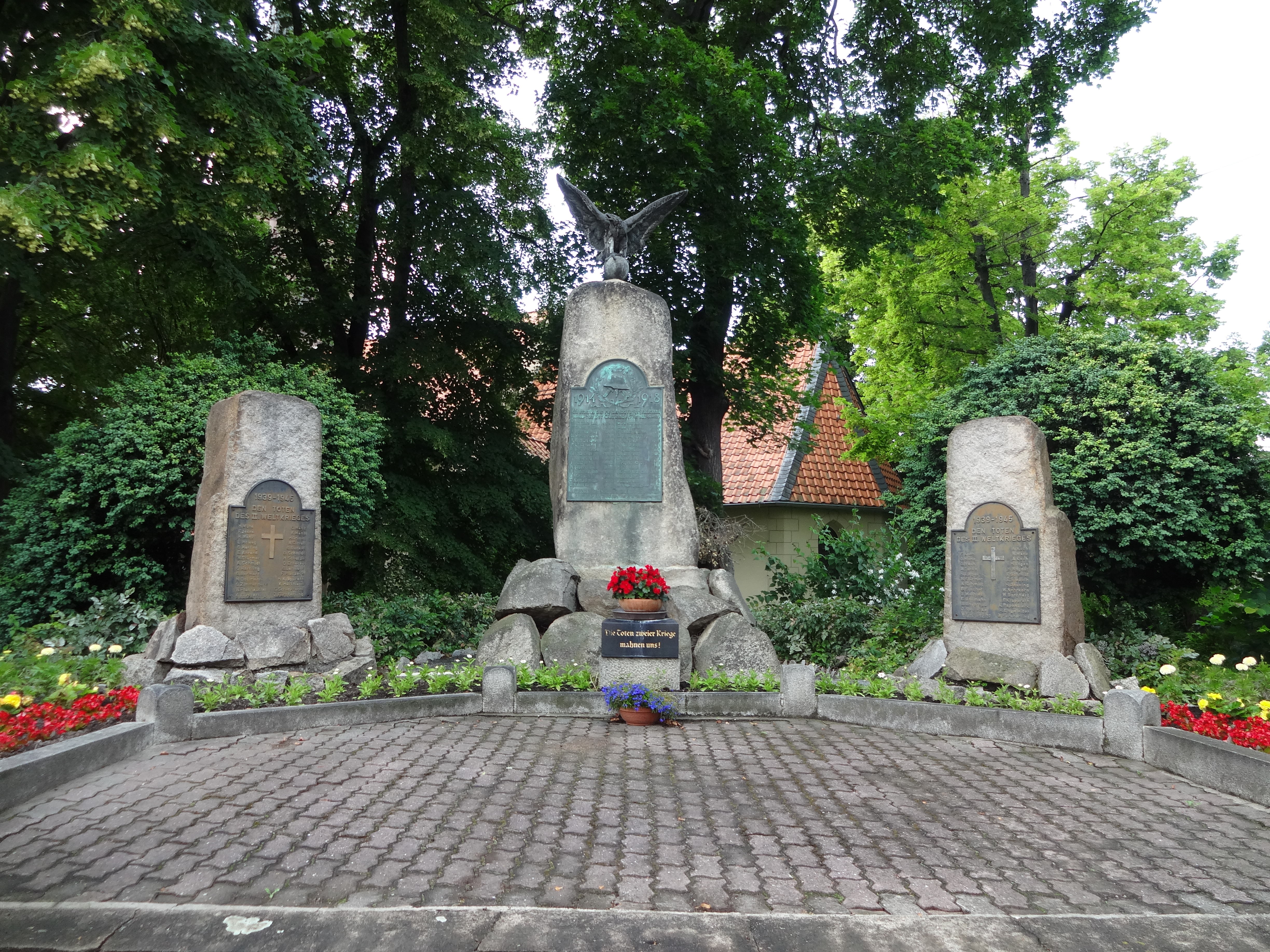 Kriegerdenkmal Silstedt